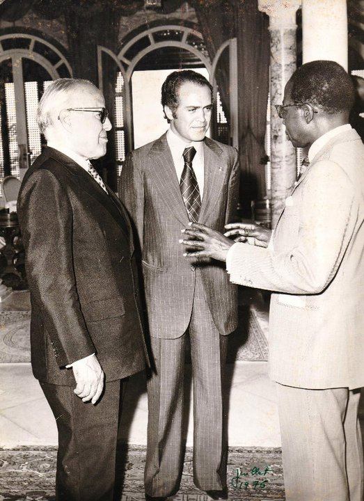 Bourguiba avec leopold Sedar Senghor et au milieu Mohamed Sayeh